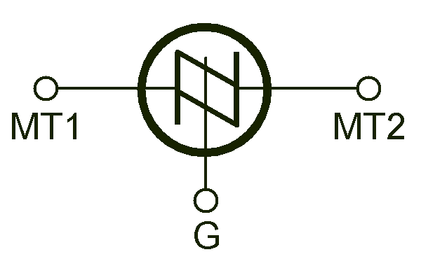 Schematische weergave van een SBS (volgens Motorola)